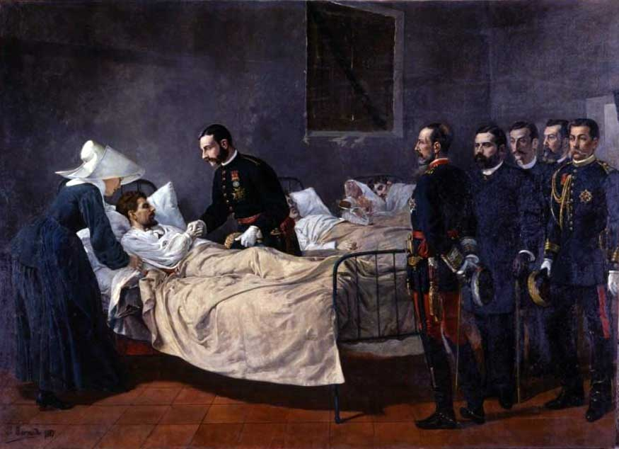 El lienzo muestra al rey Alfonso XII de España (1857-1885), visitando el Hospital de Coléricos de Aranjuez en 1885, ya que el monarca convirtió la Casa de Marinos en un improvisado hospital para atender a la población, a la que visitó, despertando además la admiración popular por su valentía. Este hecho se recuerda con una estatua en honor a este monarca colocada en la Plaza de la Constitución de Aranjuez.